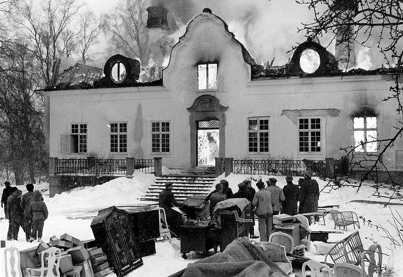 Värnbergs flygelbyggnad uppförd 1802-1803 genomgick ombyggnad 1910 men brann 1954 ned.